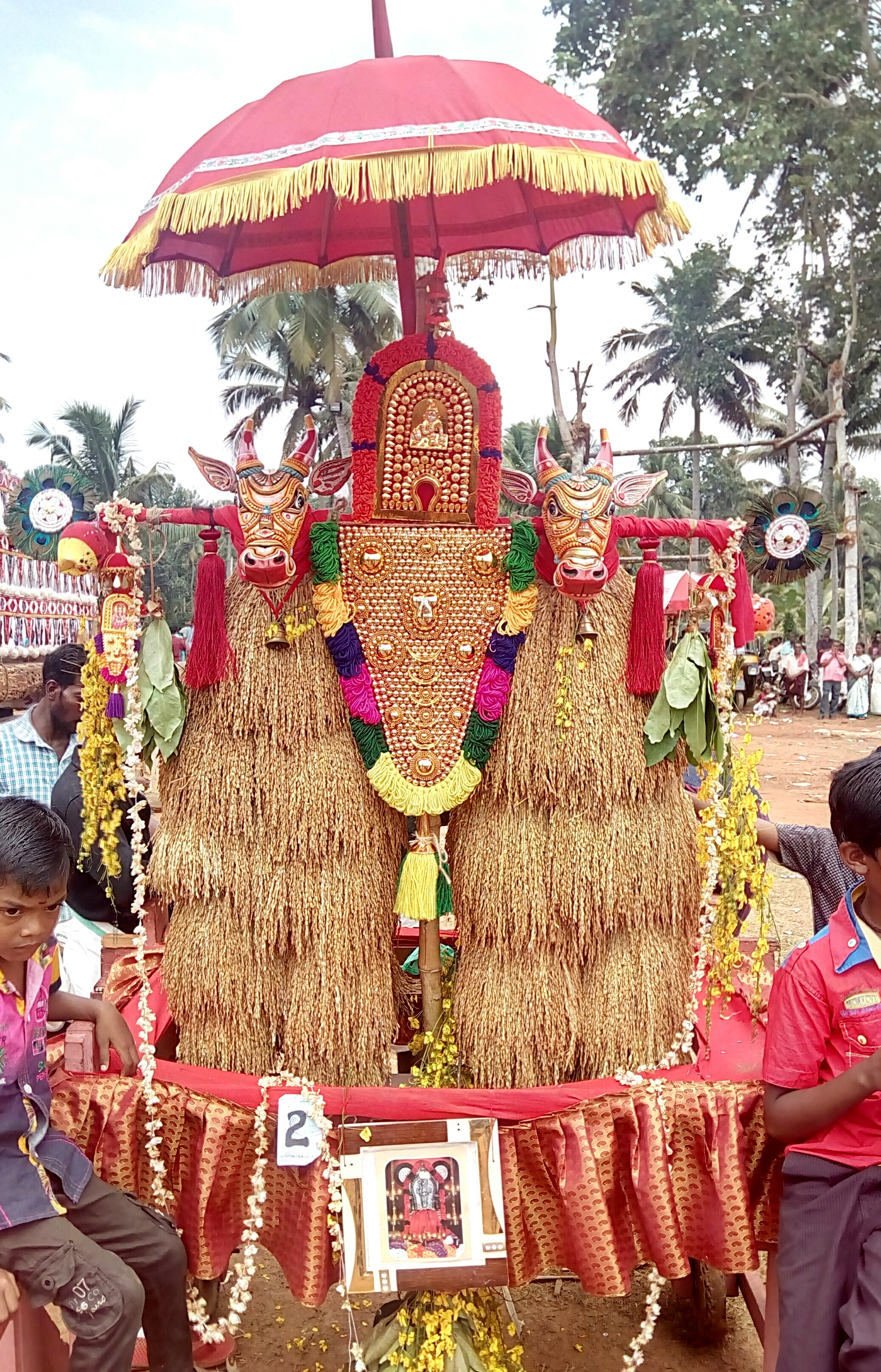 Kathirkala Orippuram Thatta